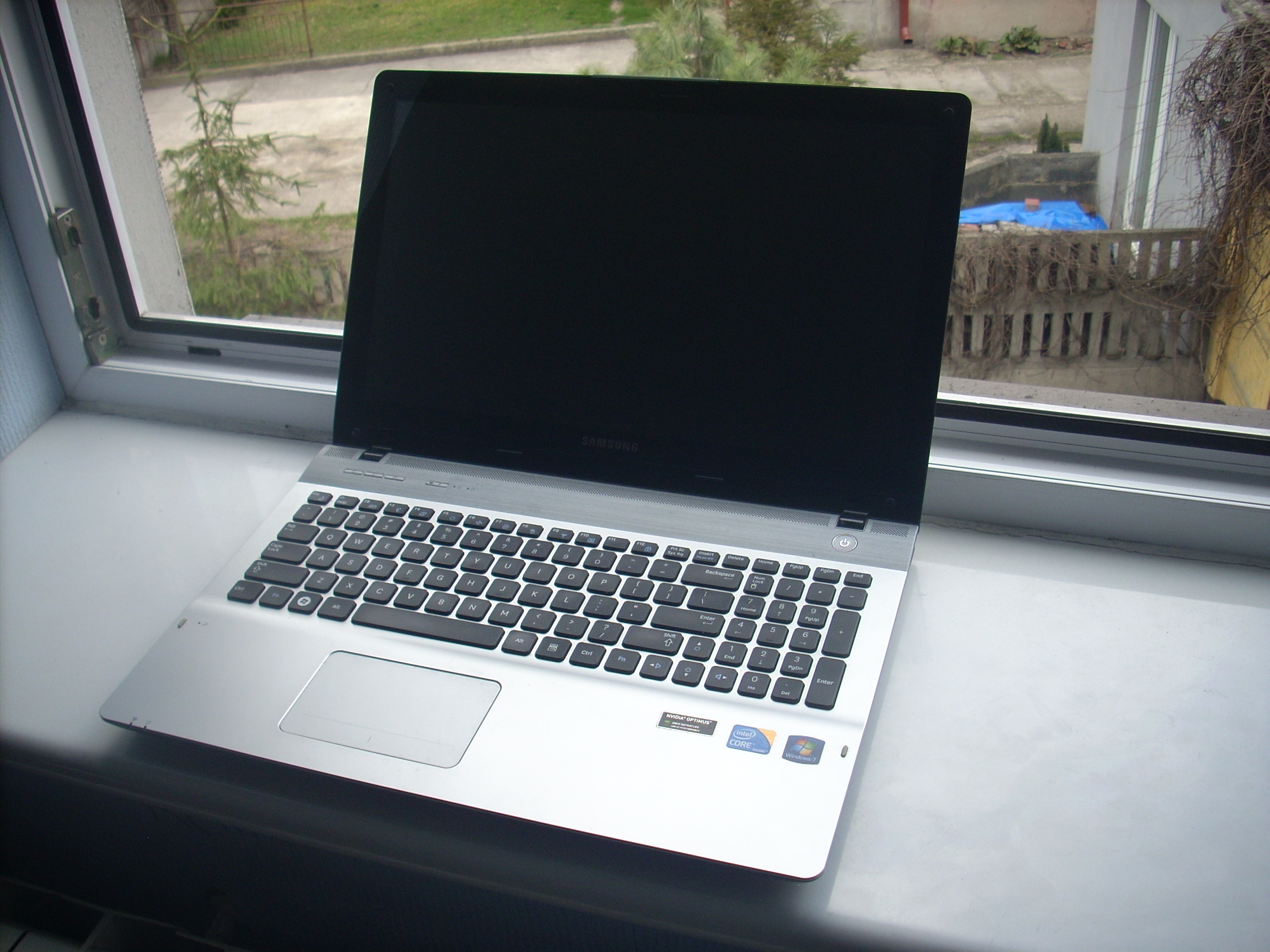 Komputer - laptop (notebook) Samsung QX-510 - wnętrze